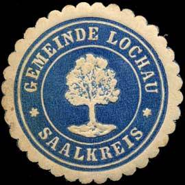 Sealing stamp Title: Gemeinde Lochau - Saalkreis Description: blau, weiß, geprägt Place: Lochau size: 4 cm